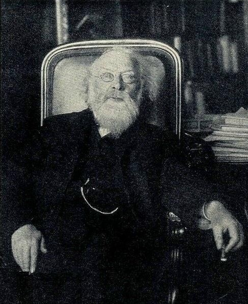 Professor Georg Loeschcke 1906